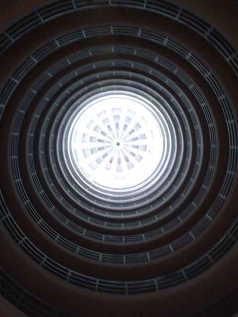 Lucernario sommitale